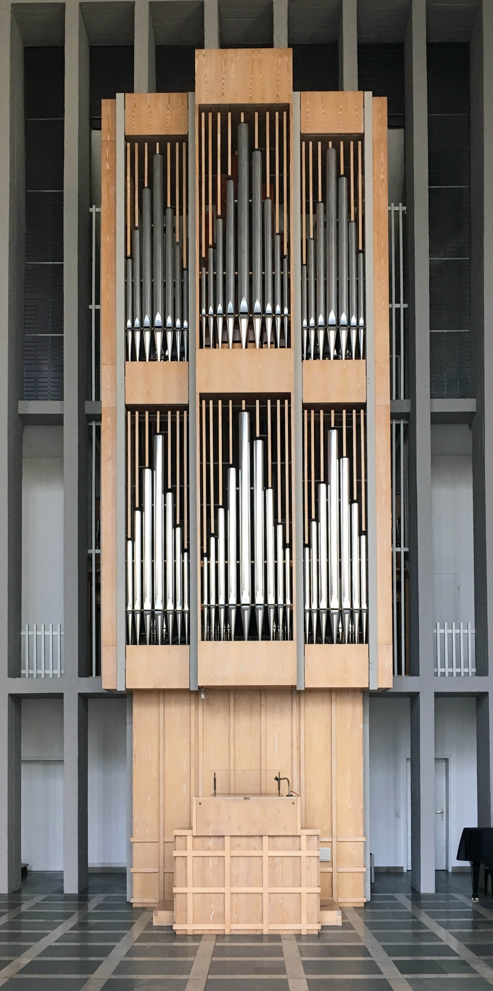 Breil Orgel in der Hl.-Kreuz-Kirche, Dülmen